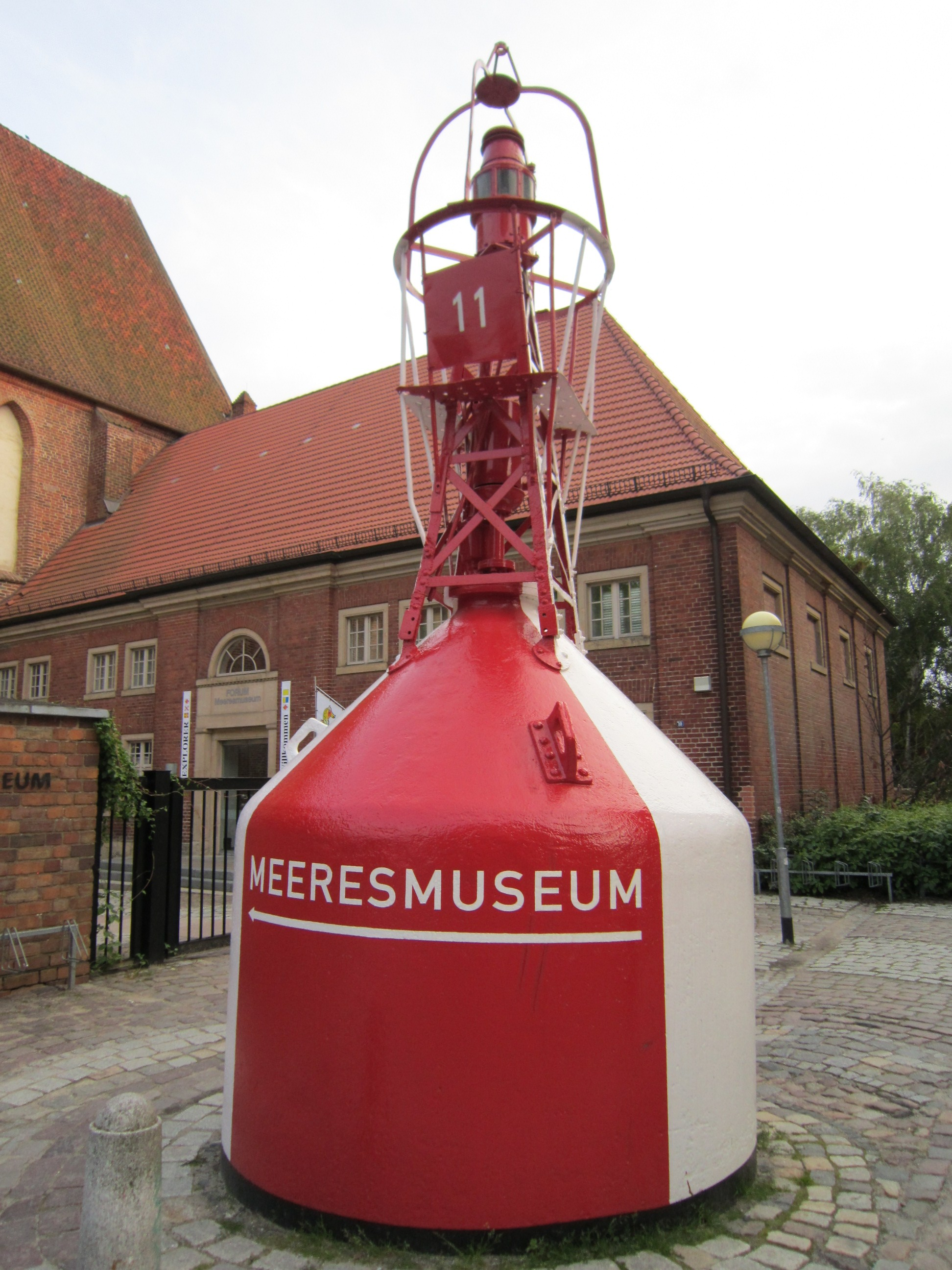 Bake mit Werbung für das Deutsche Meeresmuseum in Stralsund vor dessen Eingang